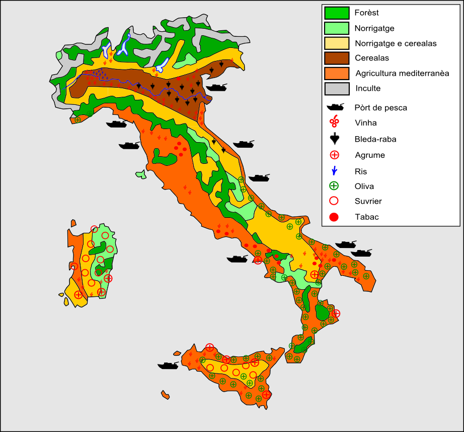 Agricultura d'Itàlia.